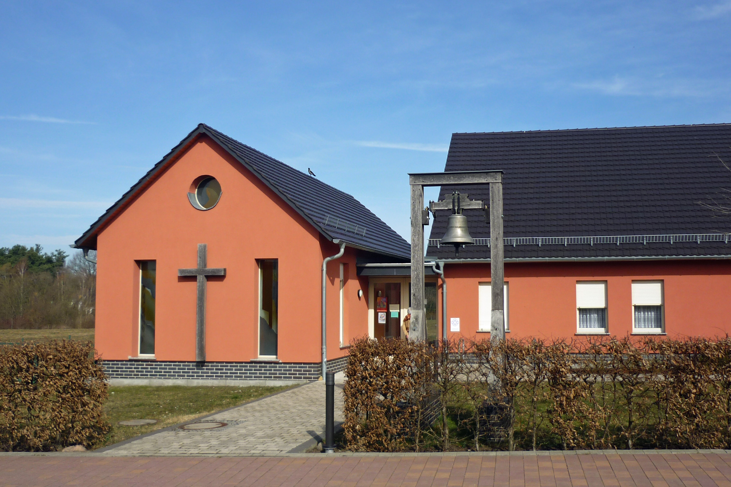 Kapelle in Neu-Haidemühl bei Spremberg/NL, Straße der Einheit